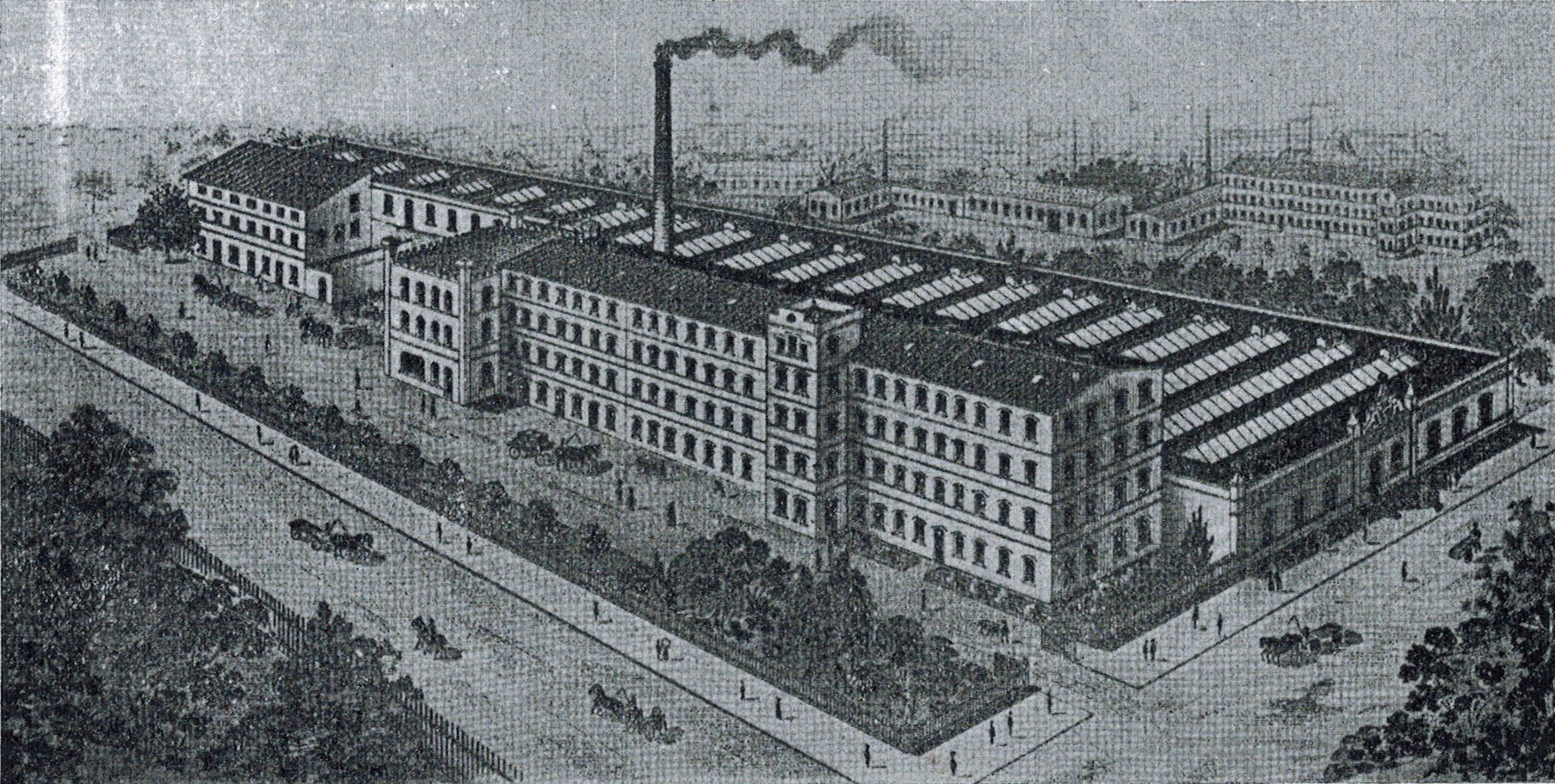 Fabrik Eschenhagen, früher